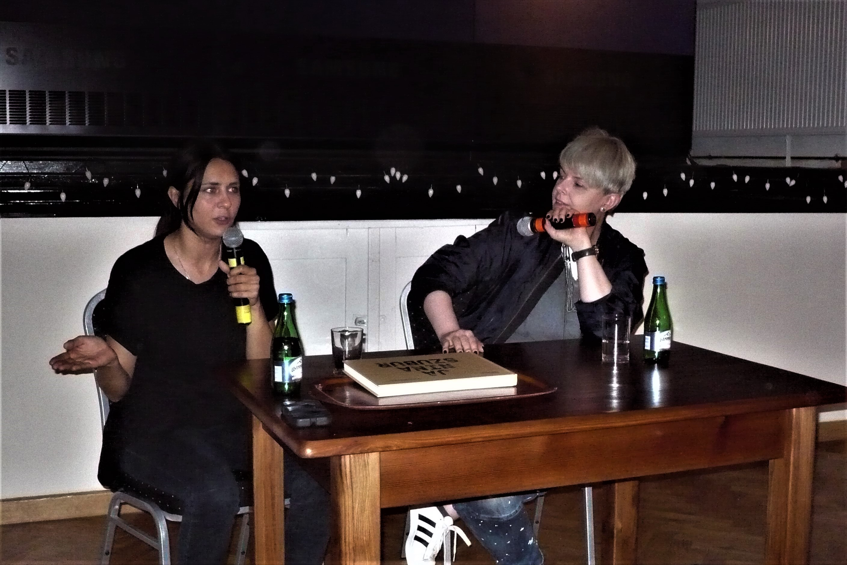 Jagoda Szelc i Karolina Korwin Piotrowska podczas Festiwalu Góry Literatury, 15.07.2018